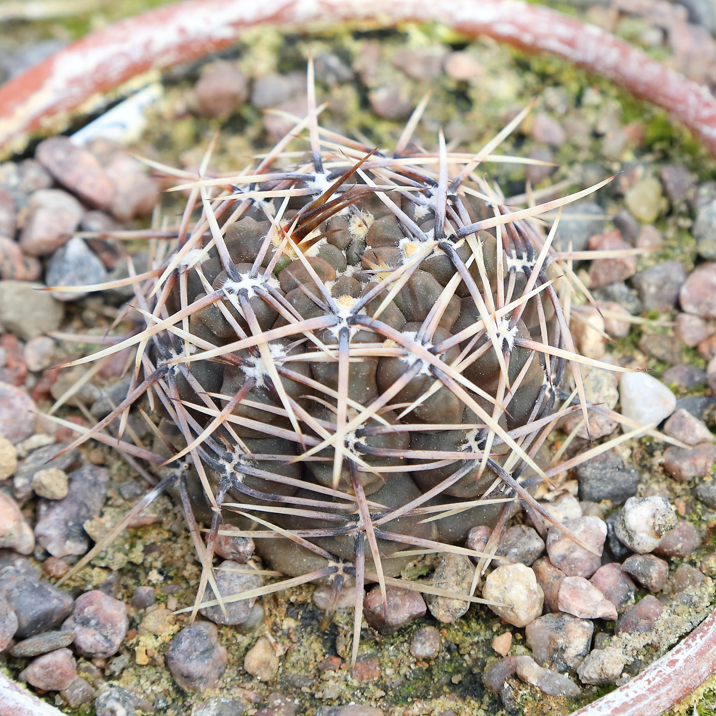 Gymnocalycium gibbosum ssp. borthii identifierad med hjälp av skylt i Göteborgs botaniska trädgård.